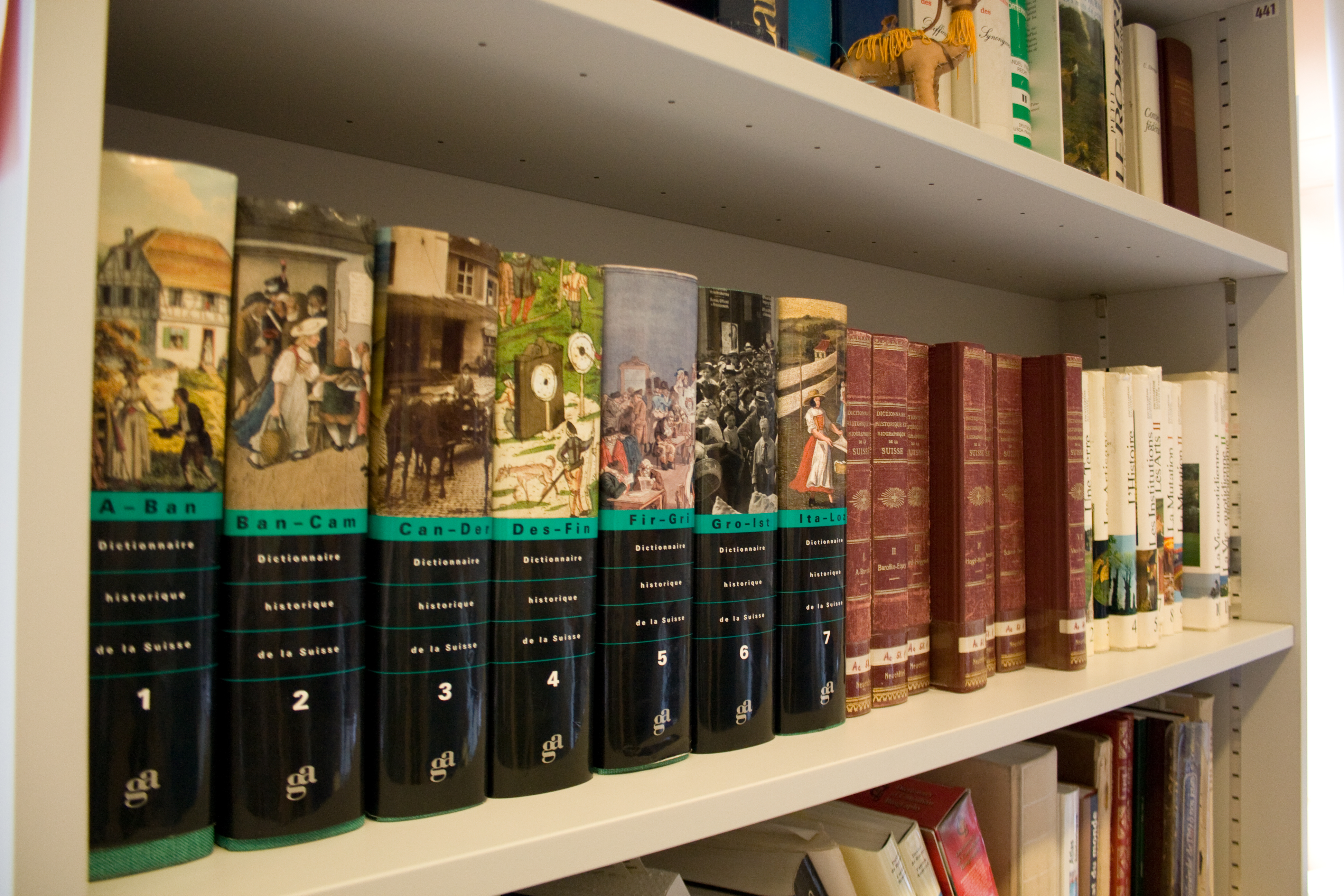 Rédaction du Dictionnaire historique de la Suisse à Berne